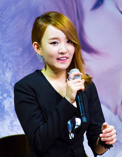 윤하 Just Listen 앨범 발매 쇼케이스 130502 촬영, 130827 게시 by Y-studion 달덩이 님